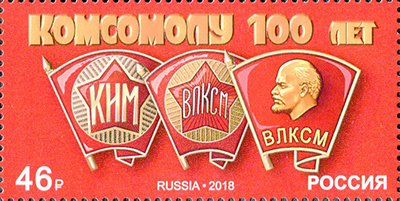 100 лет комсомолу.